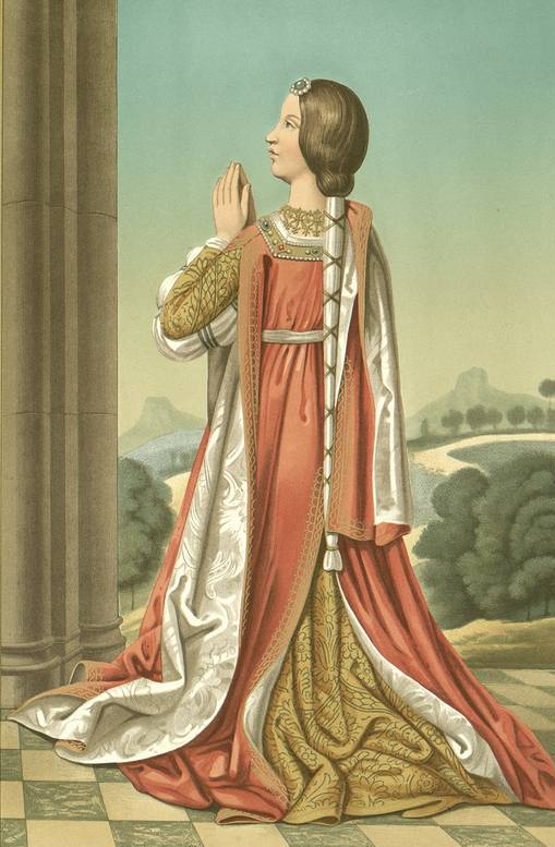 La princesa doña Isabel, hija de los Reyes Católicos.